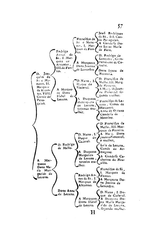 Página 57 das Memorias Historicas e Genealogicas dos Grandes de Portugal - Costados dos Marqueses de Fontes